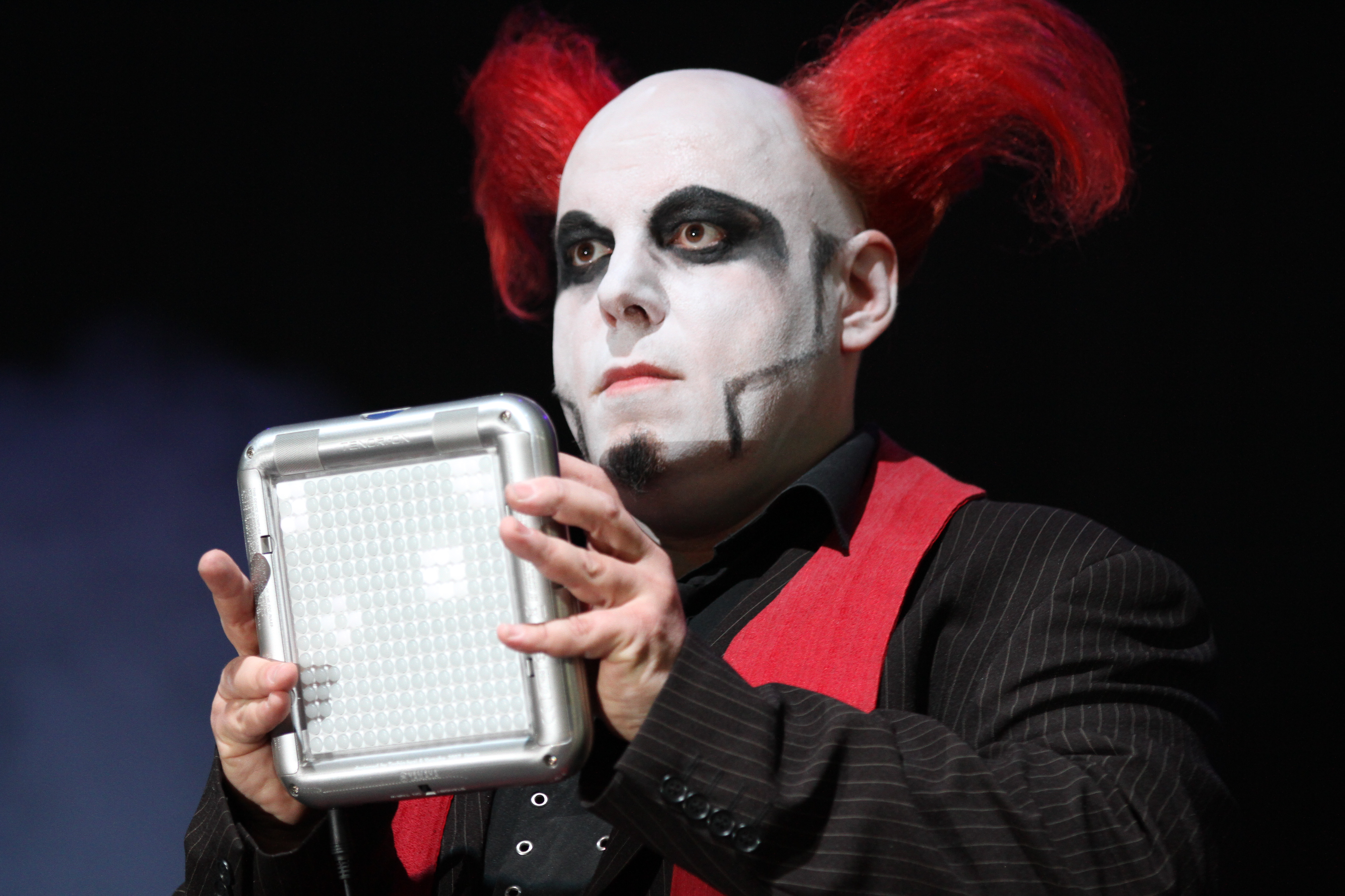 Bruno Kramm von Das Ich auf dem Wave-Gotik-Treffen 2013 in der Agra-Halle.